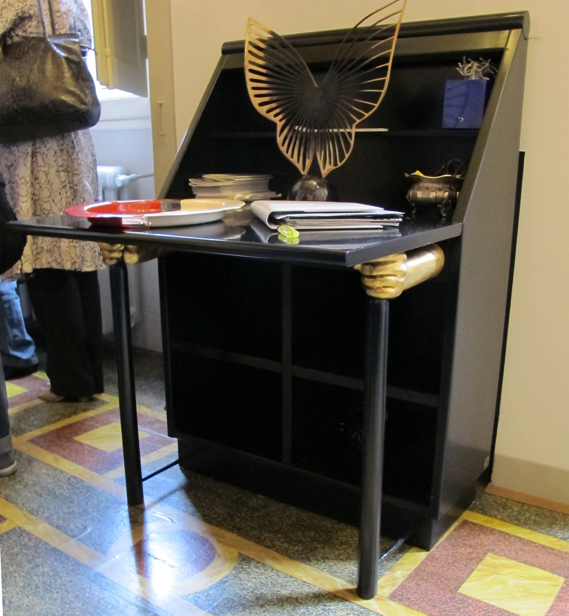 Adolfo Natalini, scrittorio